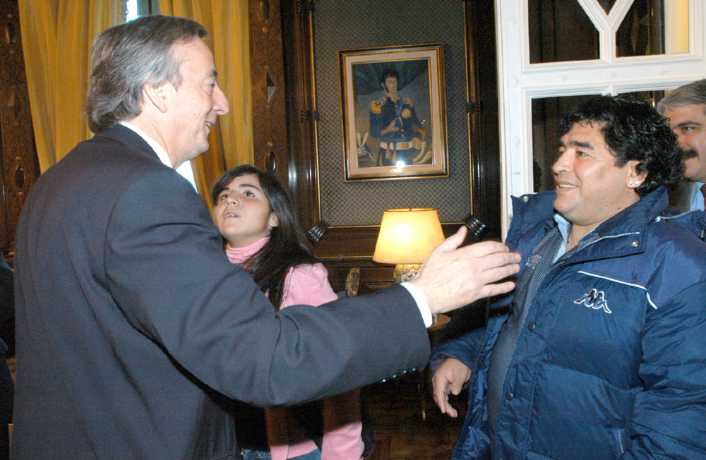 Casa Rosada, Despacho Presidencial - El presidente Néstor Kirchner recibió a Diego Maradona.